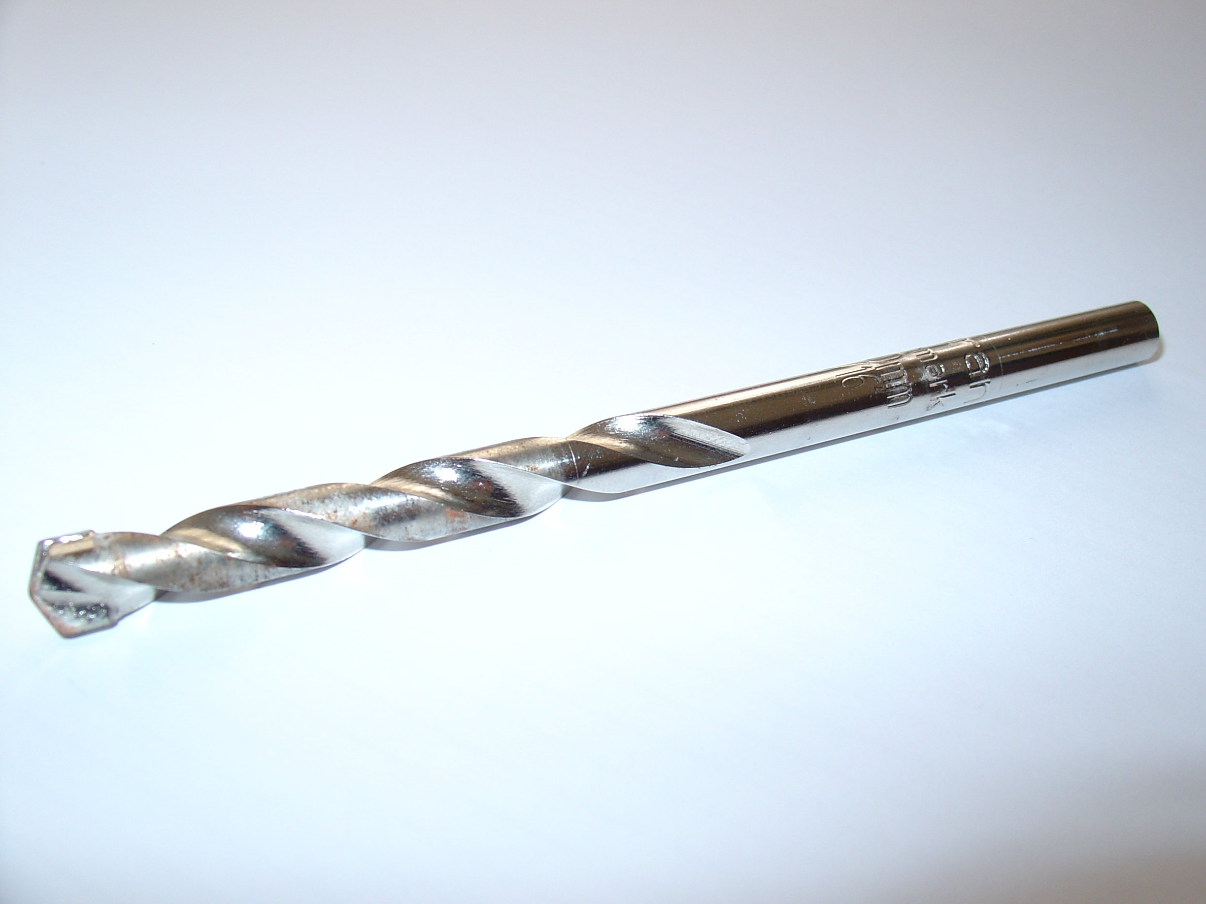 Broca para taladro (drill bit) helicoidal, piedra, de 8 mm